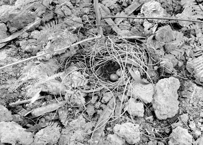 Repronegatief. Overhuifd nest met eieren van Vechtkwartel (Turnix s. suscitator)